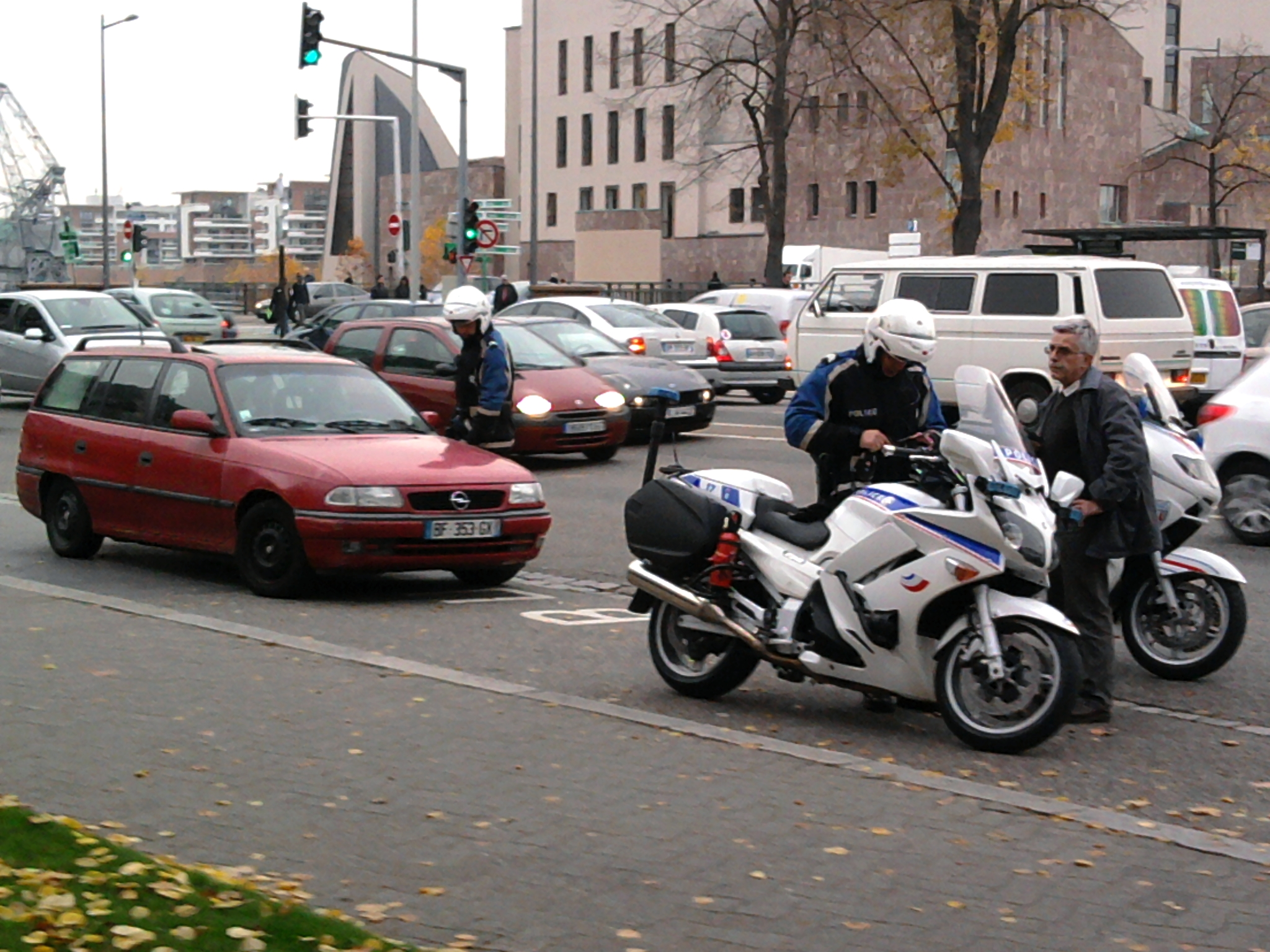 Contrôle par des motards de la Police Nationale, Strasbourg